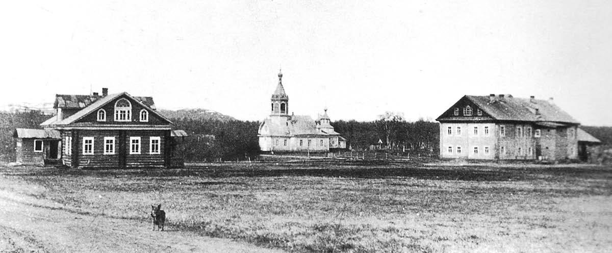 Три́фонов Пе́ченгский монасты́рь. Фотография начала XX века.